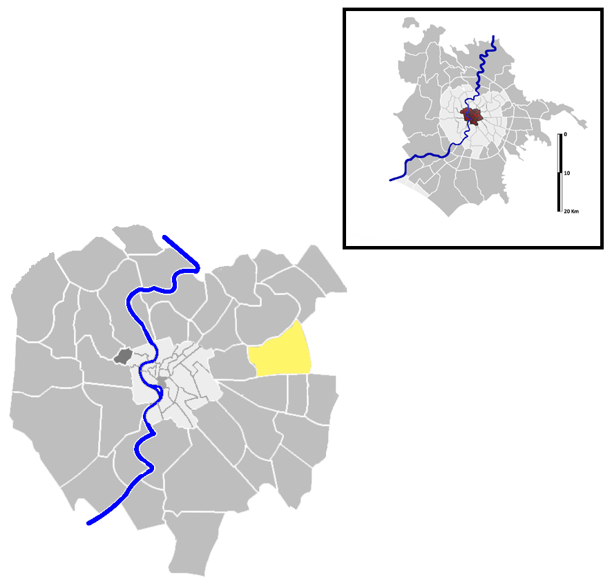 Collatino